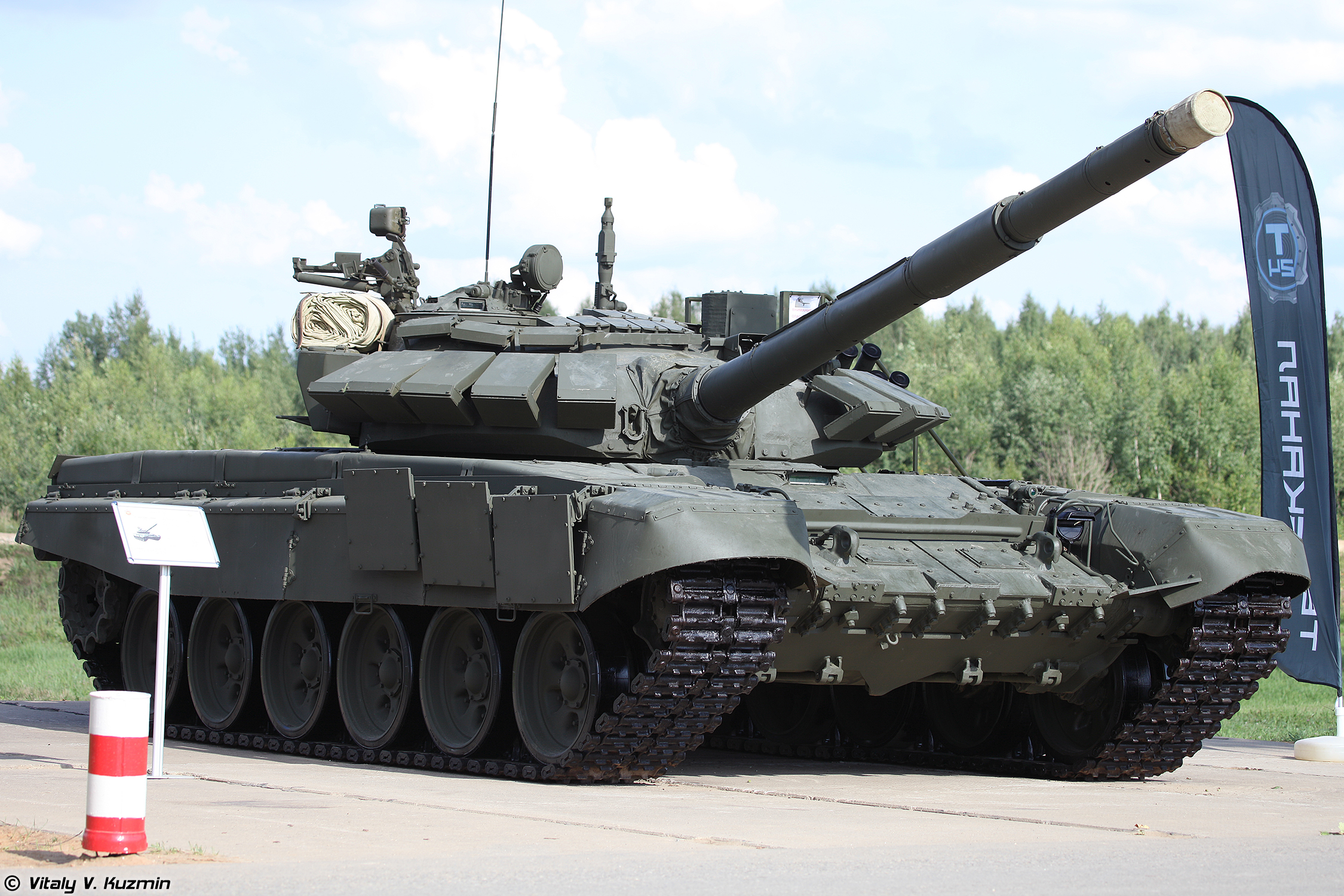 Т-72Б3 (T-72B3)